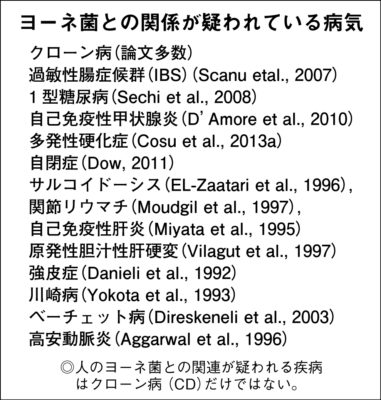 ヨーネ菌との関連が示されている疾病や強く疑われている歯間の一覧。